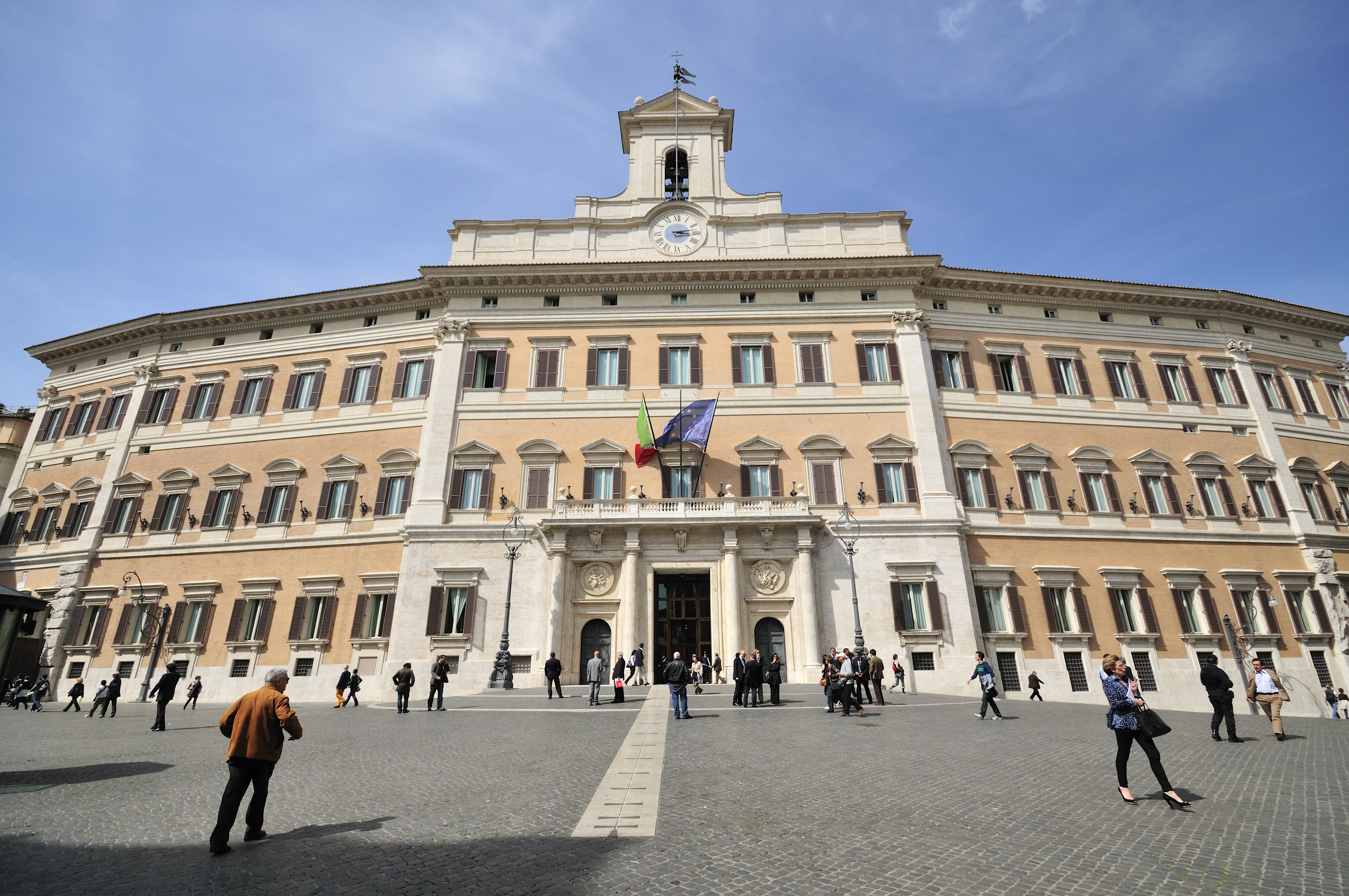 Montecitorio